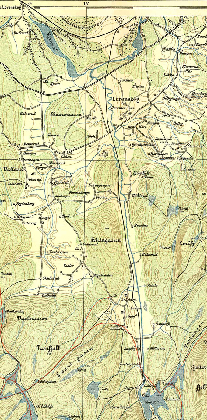 Kart over Losbylinja, Lørenskog